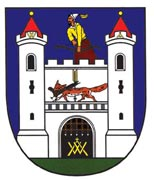 Strážovský znak